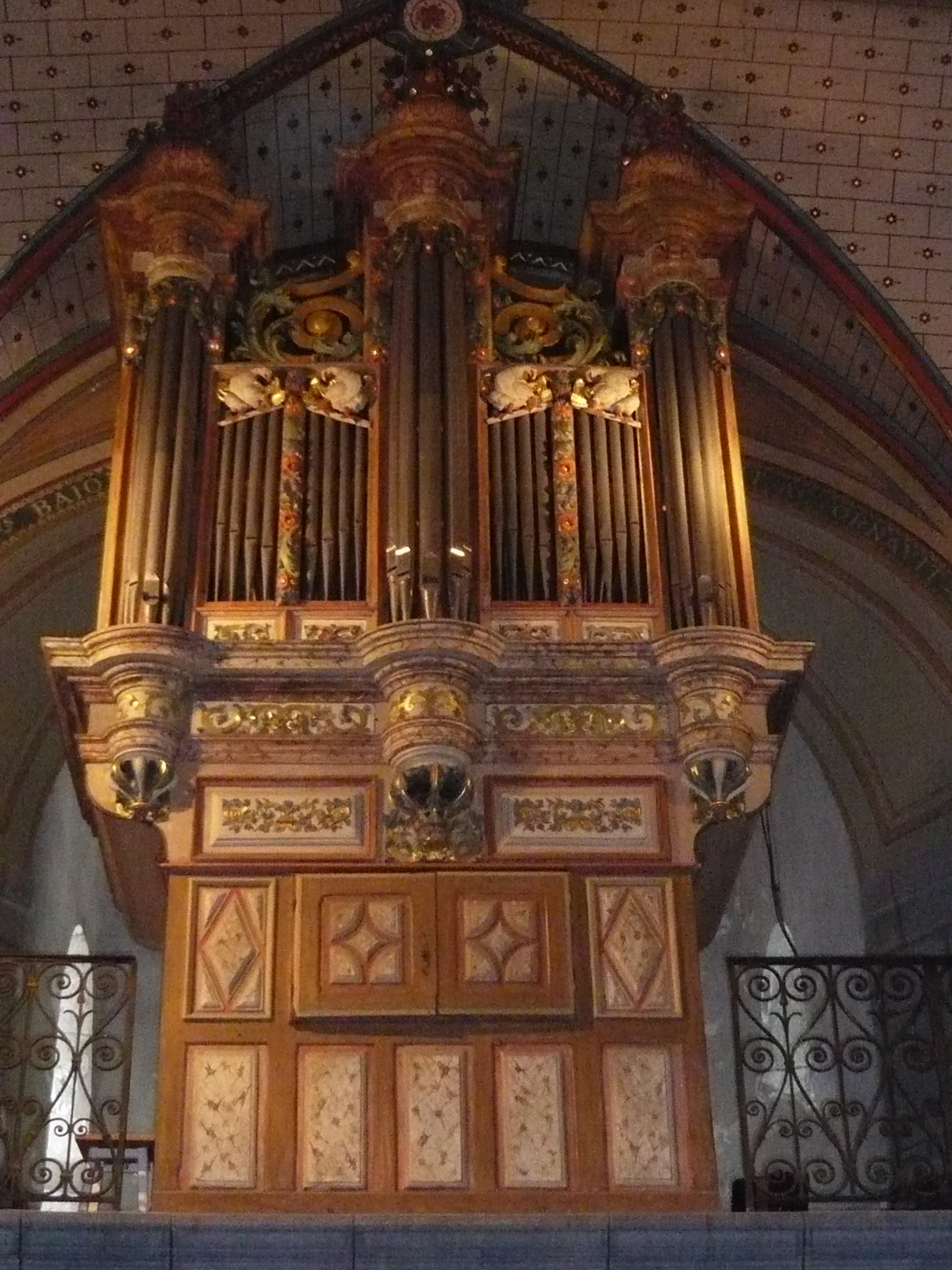 Sarrance (Pyrénées-Atlantiques, France), buffet de l'orgue de l'abbatiale Notre-Dame du couvent des Prémontrés (vers 1660), abritant désormais un instrument de Pesce & fils de 1984.